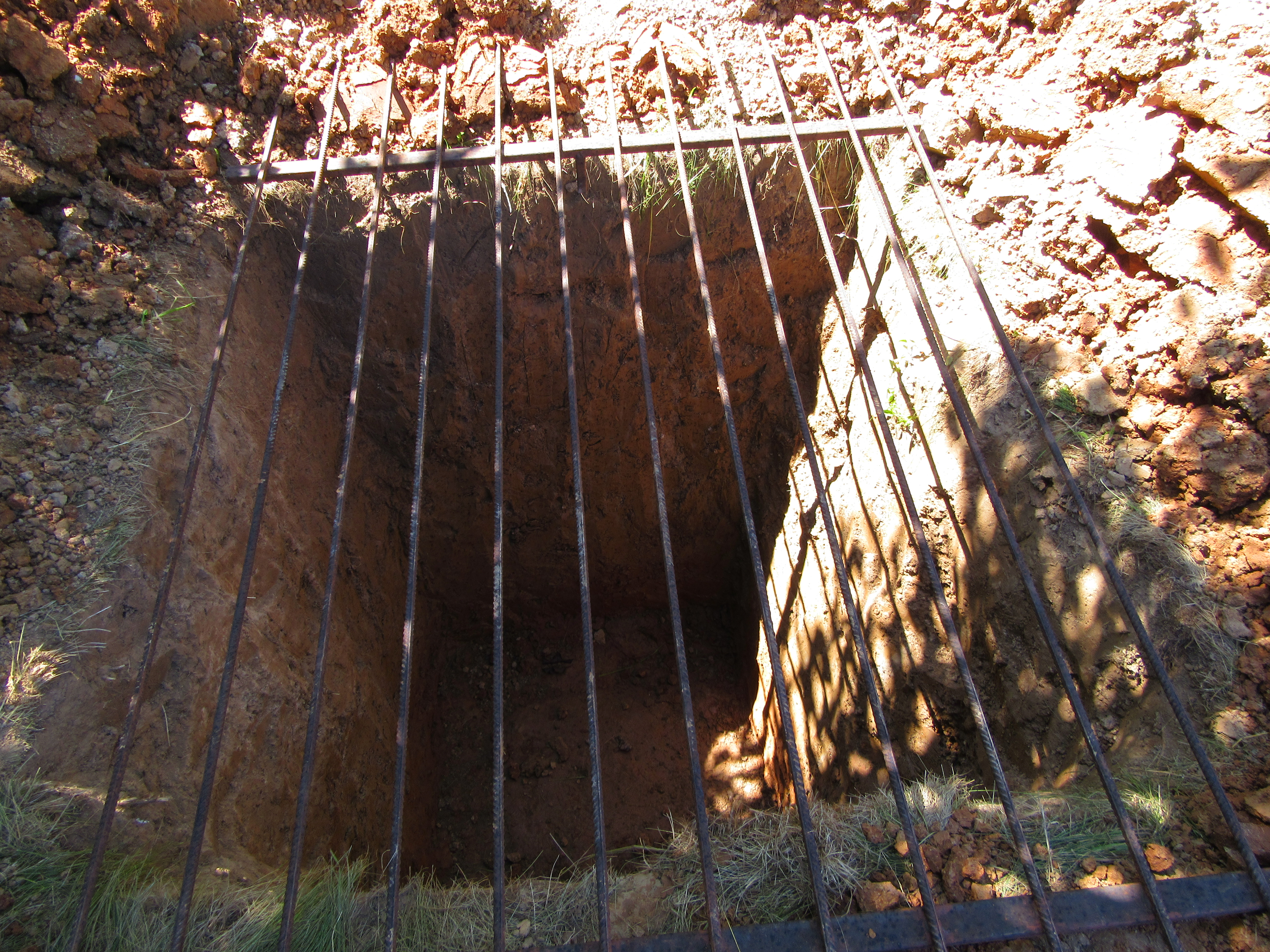 Покровные суглинки, наблюдаемые на стенках шурфа